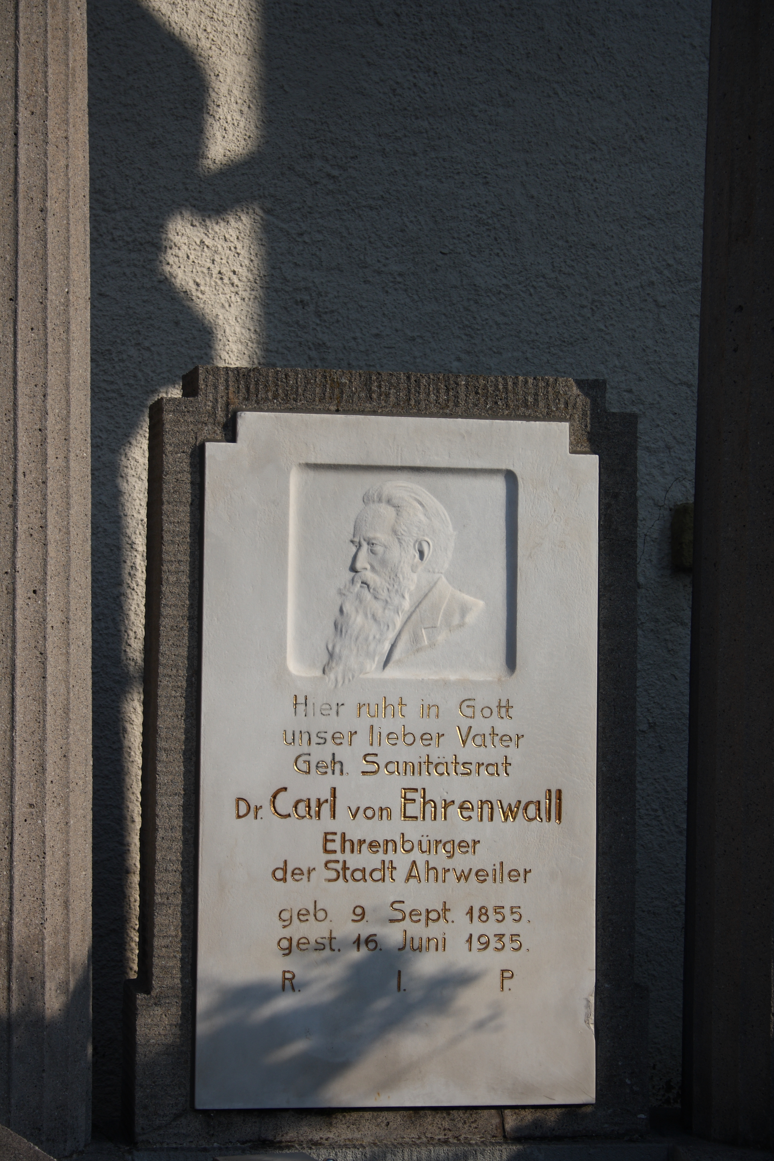 Alter Friedhof in Ahrweiler